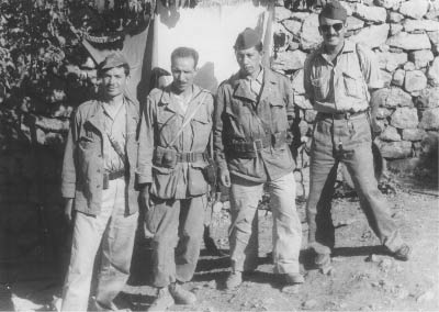 مؤتمر الصومام بالجزائر